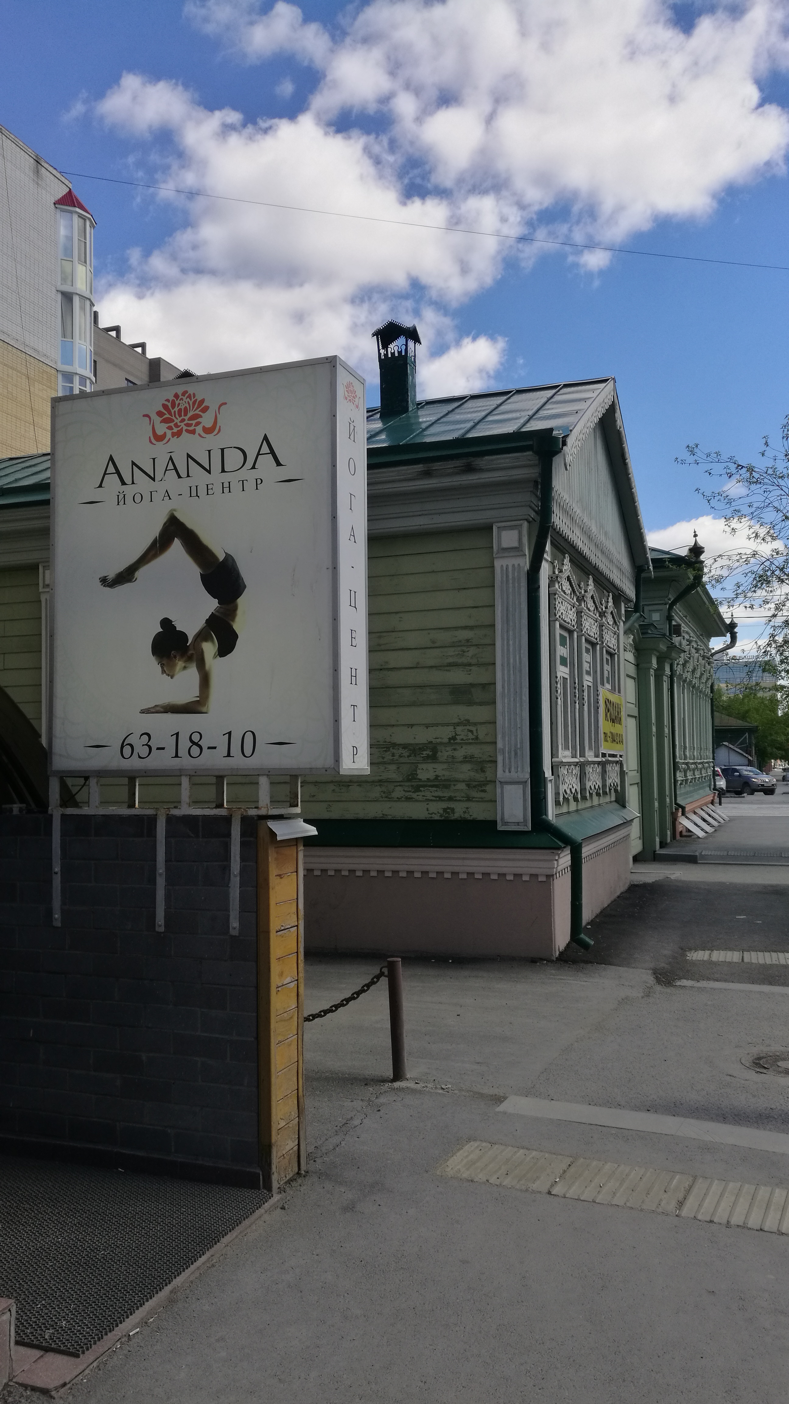 Strato Komsomolskaja. Tjumeno, Rusio.